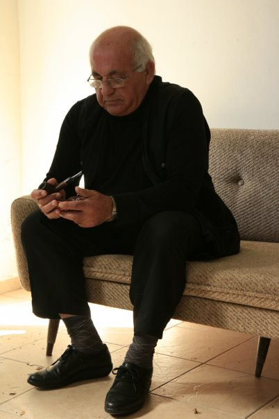 סלמאן נאטור